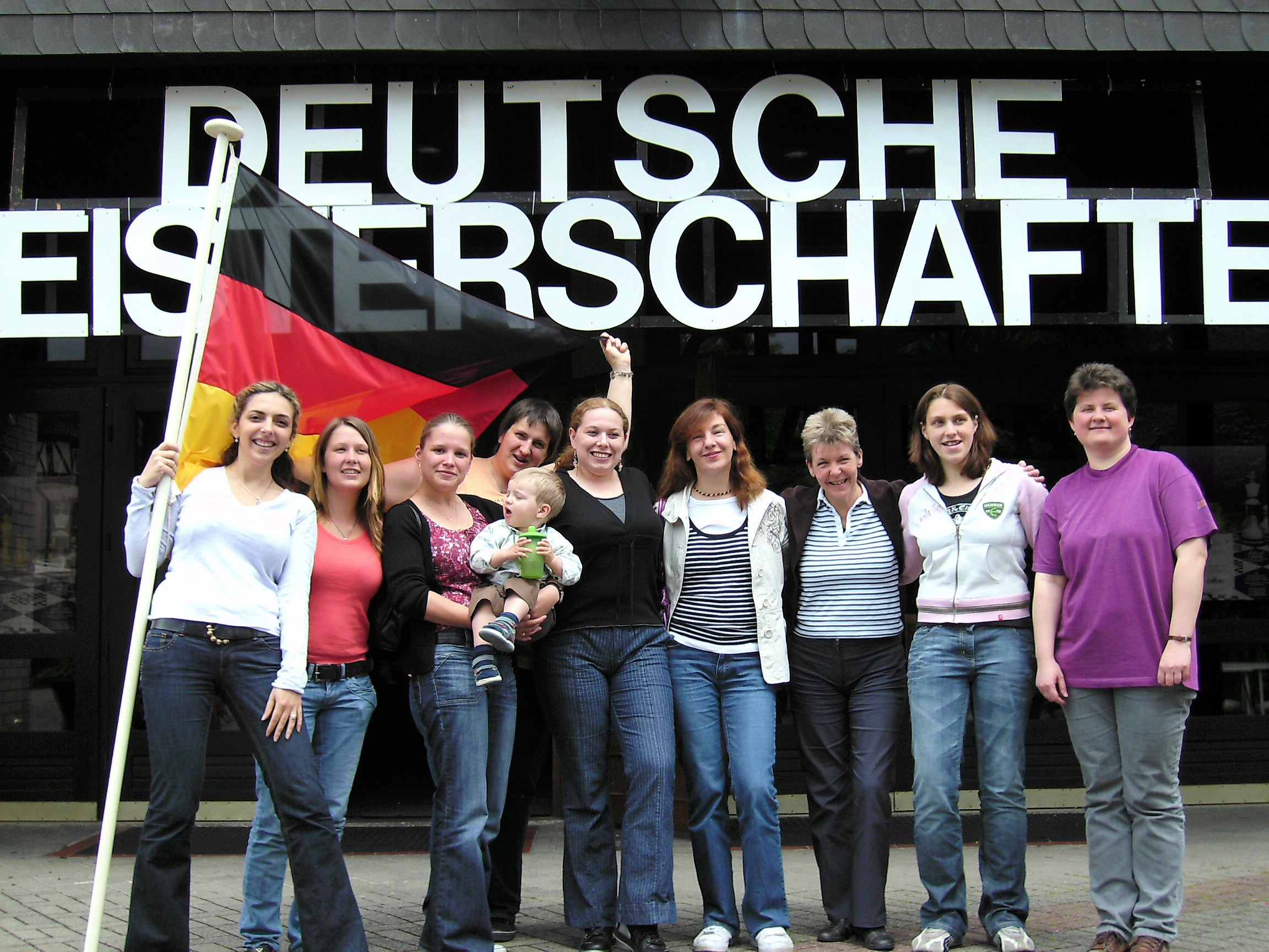 Damen aus Nordrhein-Westfalen, Sieger der Deutschen Frauenmannschaftsmeisterschaft der Länder 2009 in Braunfels. Von links nach rechts: Marina Roitburd, Sarah Hoolt, Julia Freitag, Heike Vogel, Jevgenia Leveikina, Anna Dergatschova-Daus, Isabel Hund, Daniela Drose und Irina Nattermüller.